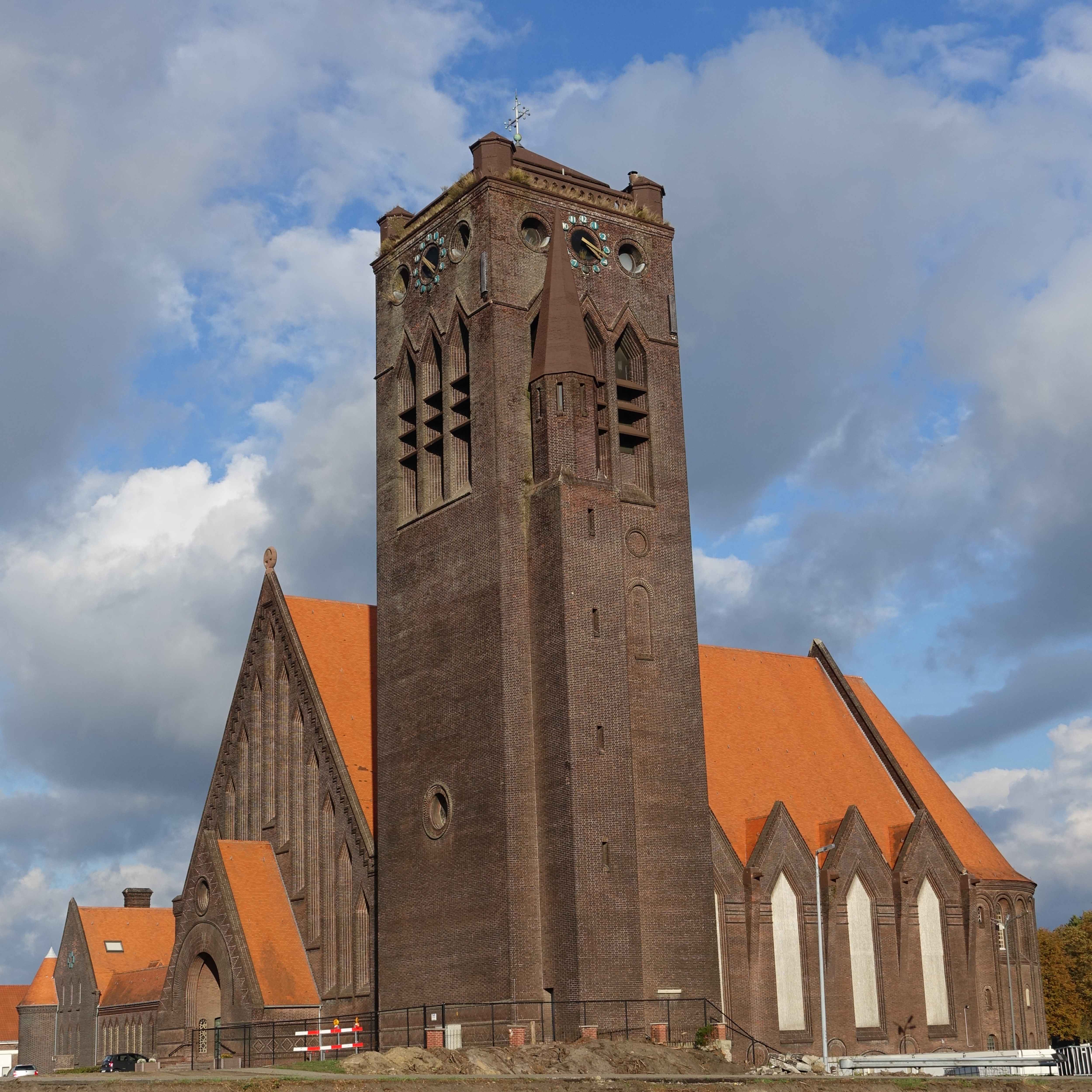 Sint-Albertuskerk, een zogeheten mijnkathedraal, in Zwartberg Genk This photo of immovable heritage has been taken in the Flemish Region